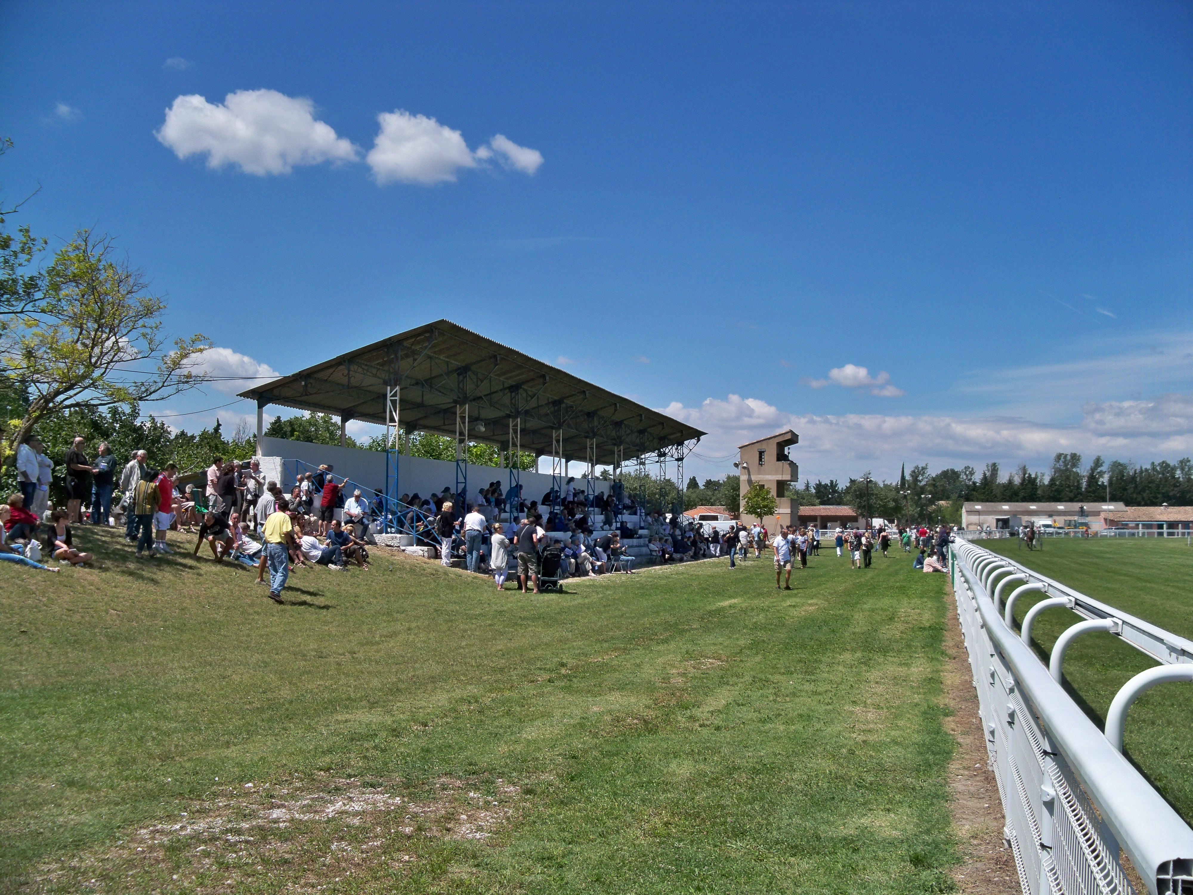 Tribune à l'Hippodrome Saint-Gervais de L'Isle sur la Sorgue (Vaucluse)